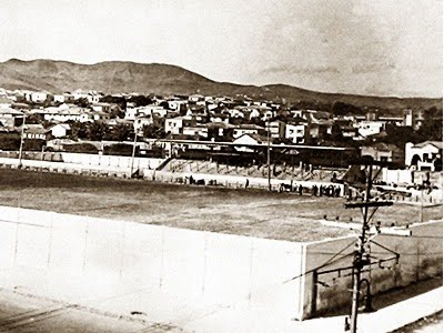 stádio do Barro Preto, em 23 de julho de 1923, enfrentou o Flamengo num amistoso. Nesta partida surgiu a identificação entre clube e bairro